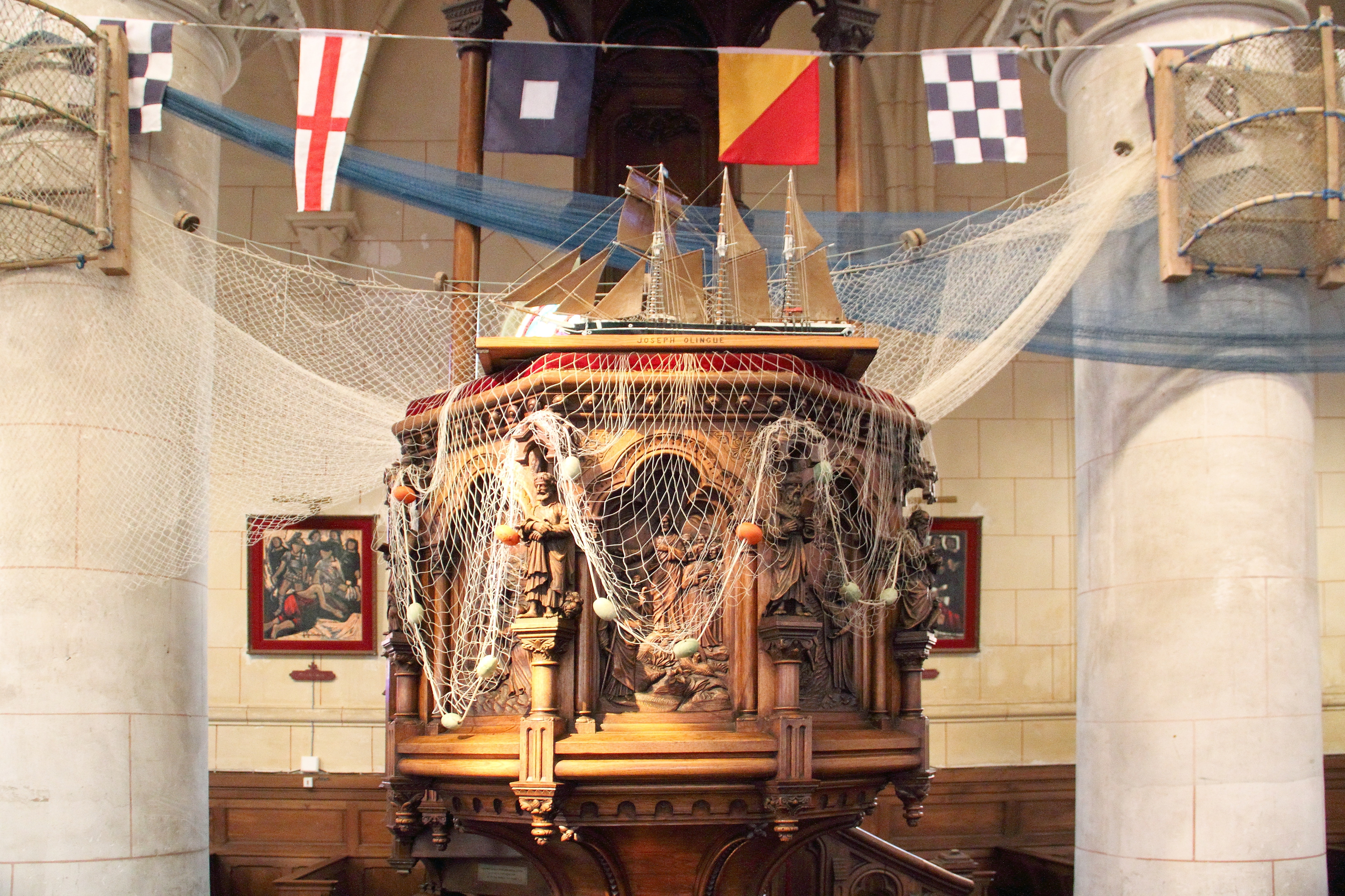 Anlässlich des jedes Jahr am 15. August in Yport stattfindenden Fête de la mer ist die Église Saint Martin festlich geschmückt.